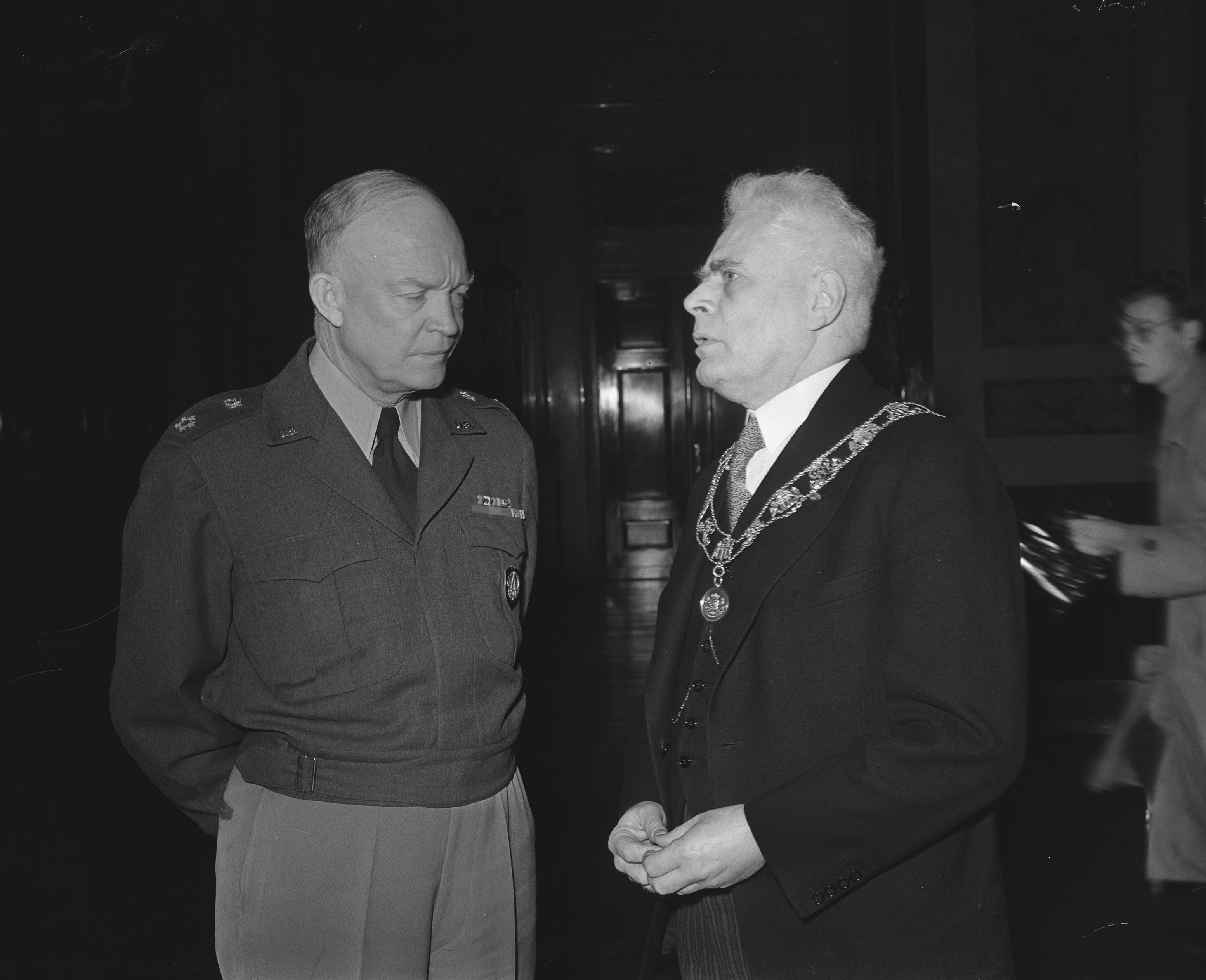 Collectie / Archief : Fotocollectie Anefo Reportage / Serie : [ onbekend ] Beschrijving : Eisenhower arriveert te Rotterdam om het commando over Canadese troepen die met het troepentransportschip Fairsea in Europa zijn aangekomen, over te nemen Annotatie : Receptie op het stadhuis. Eisenhower spreekt met burgemeester Oud Datum : 21 november 1951 Locatie : Rotterdam, Zuid-Holland Trefwoorden : burgemeesters, groepsportretten, officieren Persoonsnaam : Eisenhower, Dwight, Oud, Pieter Fotograaf : Noske, J.D. / Anefo Auteursrechthebbende : Nationaal Archief Materiaalsoort : Glasnegatief Nummer archiefinventaris : bekijk toegang 2.24.01.09 Bestanddeelnummer : 904-8591